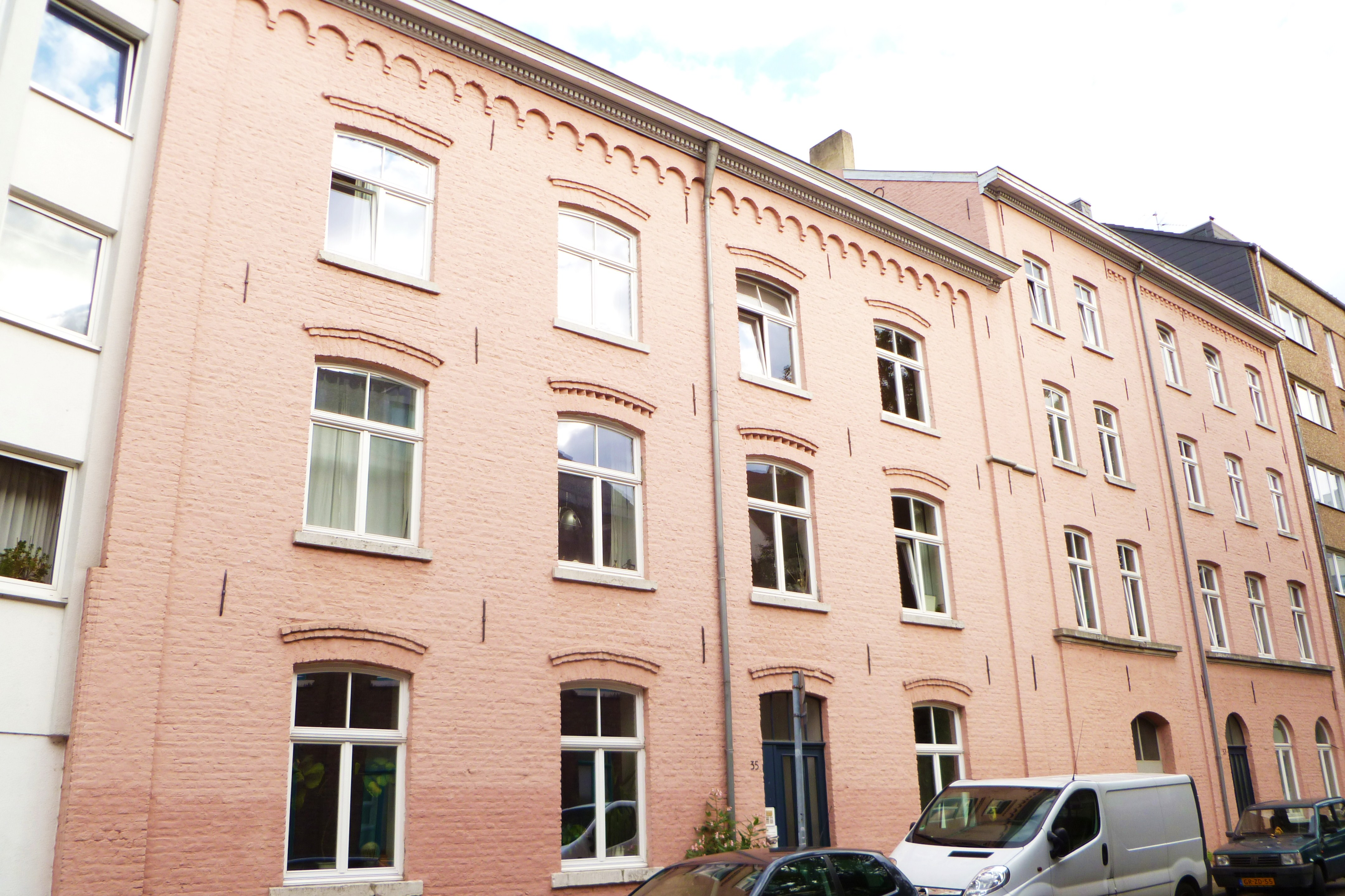 Gebäudedenkmal Malmedyer Straße 35-37